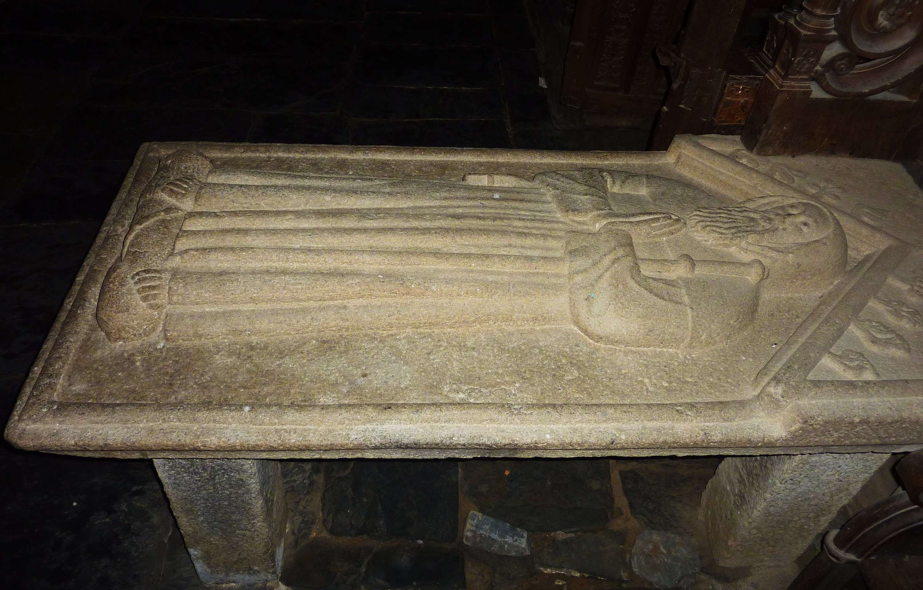 Plonévez-du-Faou (Loqueffret, Finistère, France), chapelle Saint-Herbot, le gisant de Saint-Herbot.